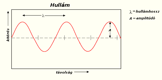 Hullám és attribútumai